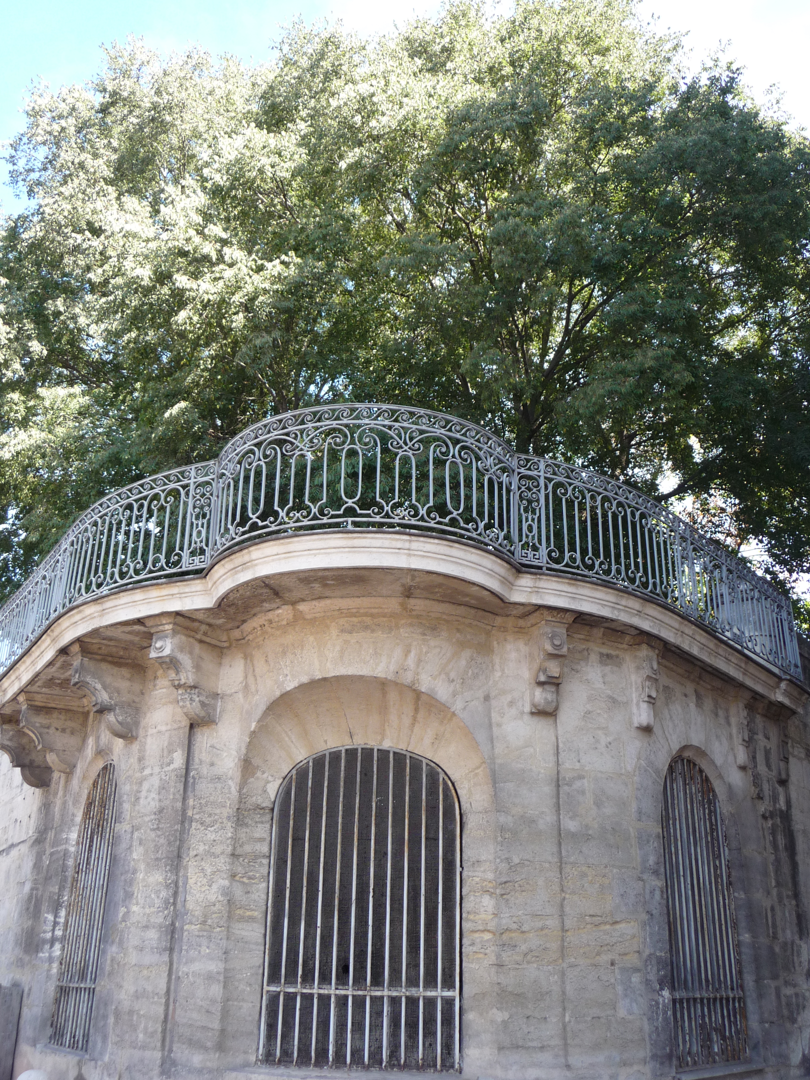 Hôtel de Lunas (Montpeller) This building is en partie classé, en partie inscrit au titre des Monuments Historiques. .